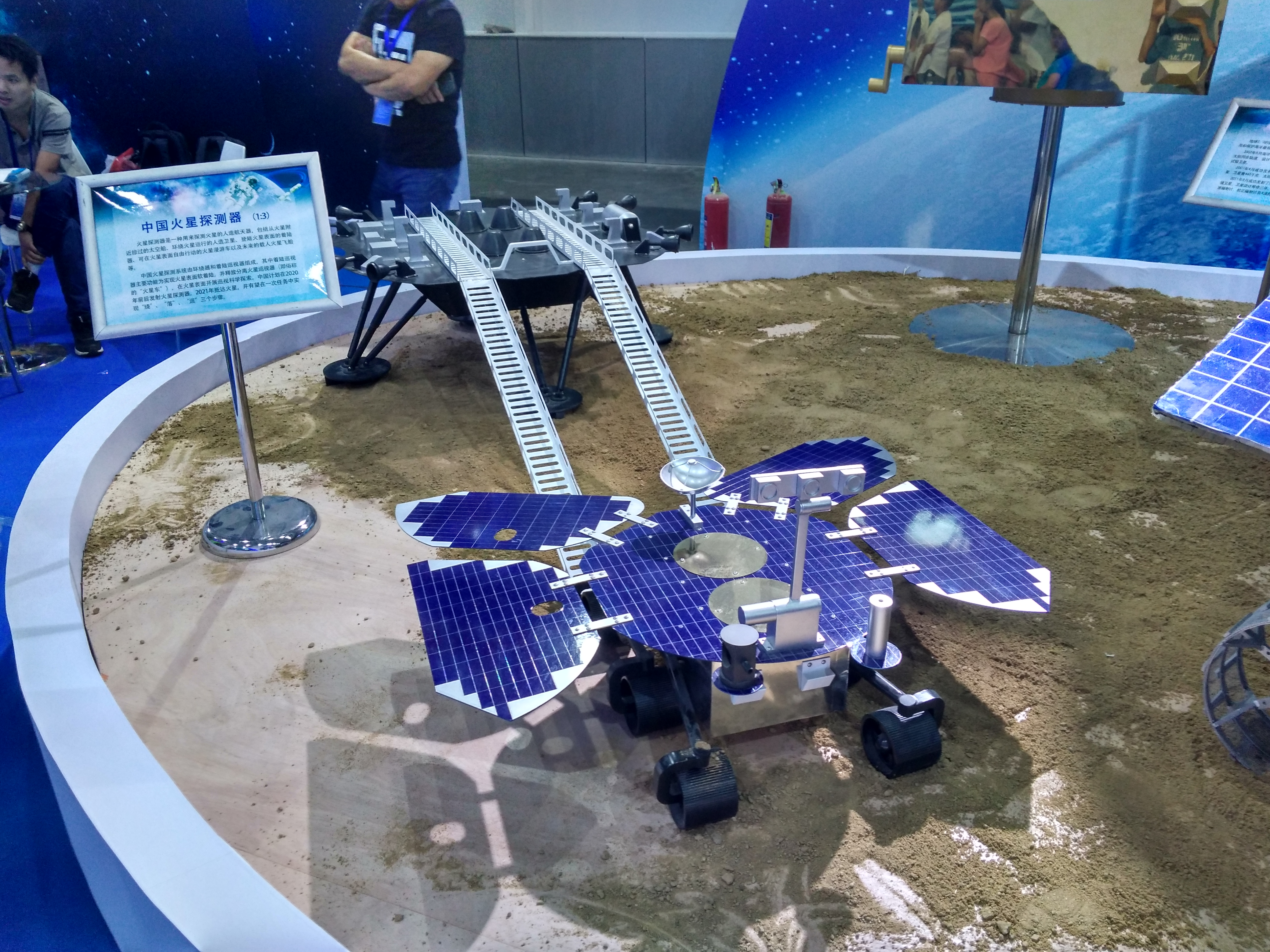 在于青岛市黄岛区举行的2018东亚海洋合作平台青岛论坛东亚商品展中展出的中国火星探测器1：3模型